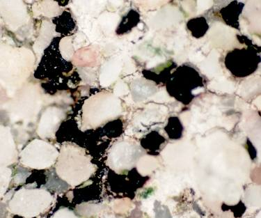 Sarcogyne regularis